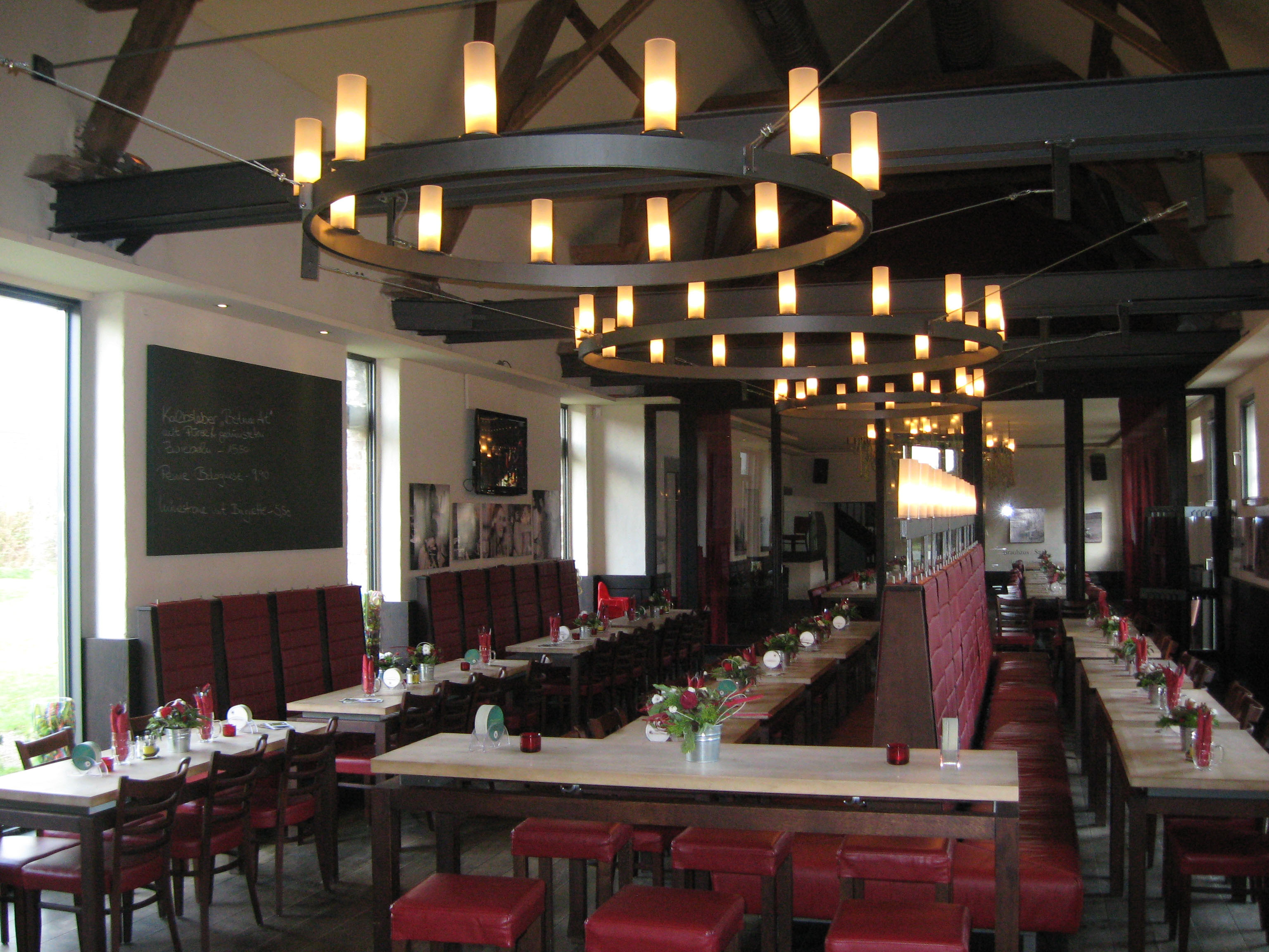 Historischer Eltzhof in Köln-Wahn (Speiseraum der Brauhaus-Gaststätte) Datum: 16.01.2011 Urheber: B. Neulich alias Benutzer:Neulich im Roxy Kino Quelle: Privates Fotoarchiv des Urhebers